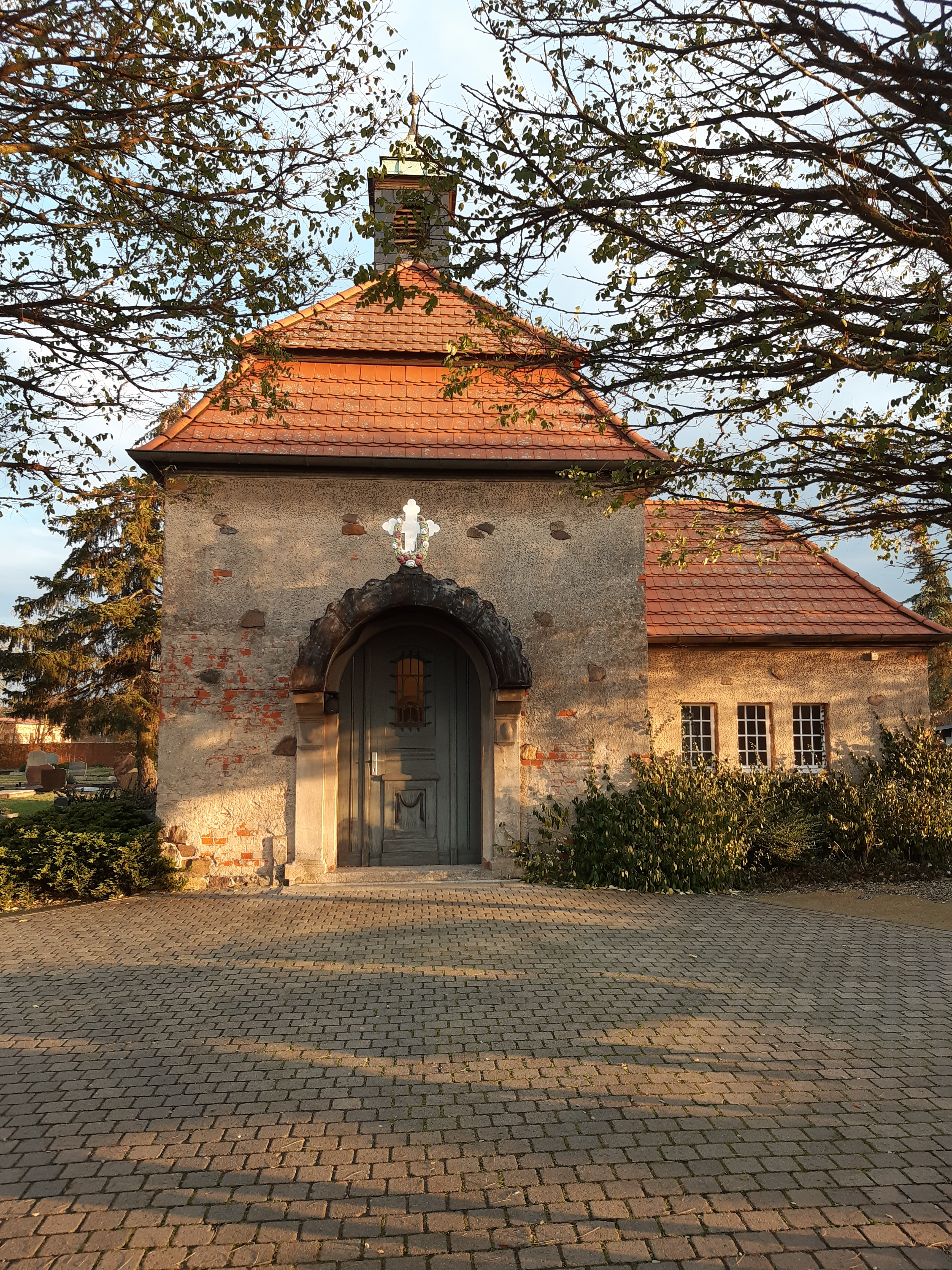 Inschriftenttafel